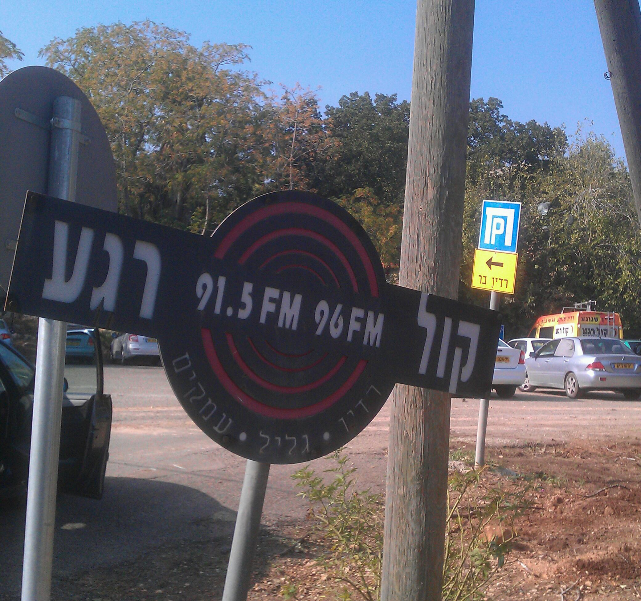 שלט של רדיו קול רגע, וברקע ניידת שידור של התחנה - בכניסה לקיבוץ בית קשת